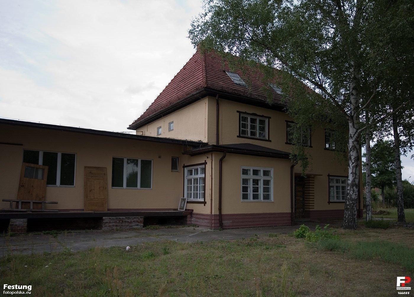 Zbliżenie na dawny dworzec kolejowy Tirschtiegel i budynek spedycyjny z rampą. Tuż za widoczną, betonową nawierzchnią była skrajnia peronu. Zauważalna jest dbałość obecnego właściciela o przywrócenie oryginalnego stanu obiektu. Zdjęcie zrobione z terenu prywatnego - podziękowania dla właściciela firmy za udostępnienie i oprowadzenie.